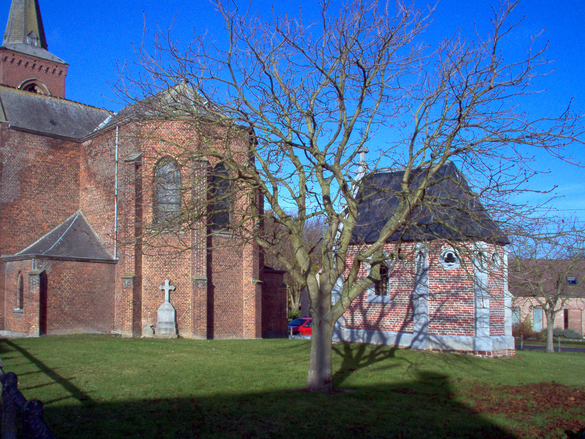 Eglise ND et mausolée des Milleville à Autreppe